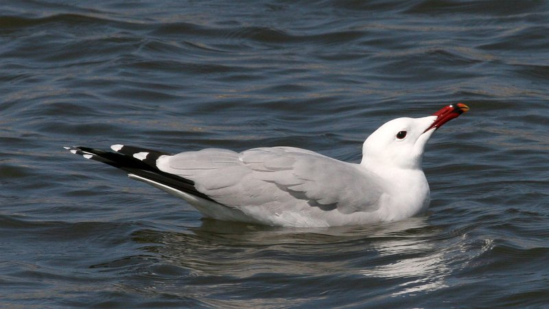 Audouin`s gull (Larus audouinii)